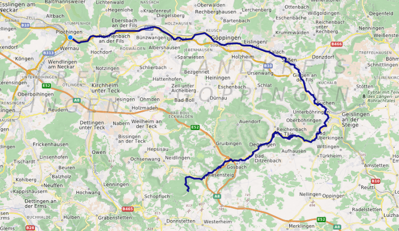 carte réalisée sur umap This map may be incomplete, and may contain errors. Don't rely solely on it for navigation.